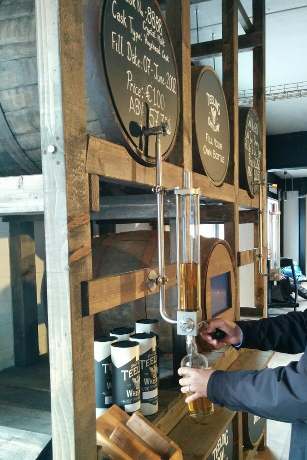 Your own Teeling bottle.